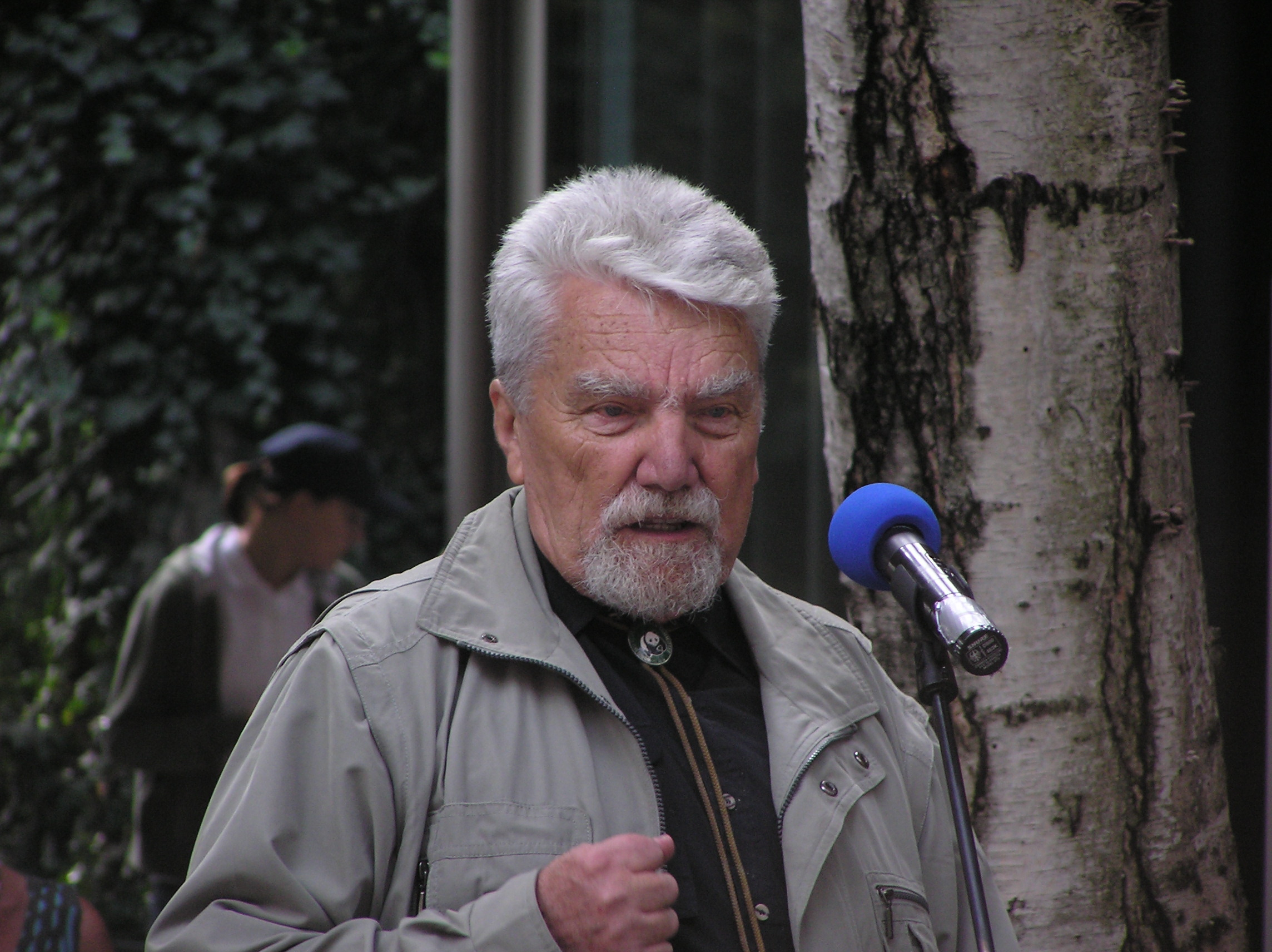 Prof. RNDr. Zdeněk Veselovský, DrSc., slavný český zoolog a etolog a ředitel Pražské ZOO v letech 1959-1988. Vyfoceno 28. září 2006. Prof. RNDr. Zdeněk Veselovský, DrSc., director of Prague ZOO in years 1959-1988. Photographed 2006-09-28.